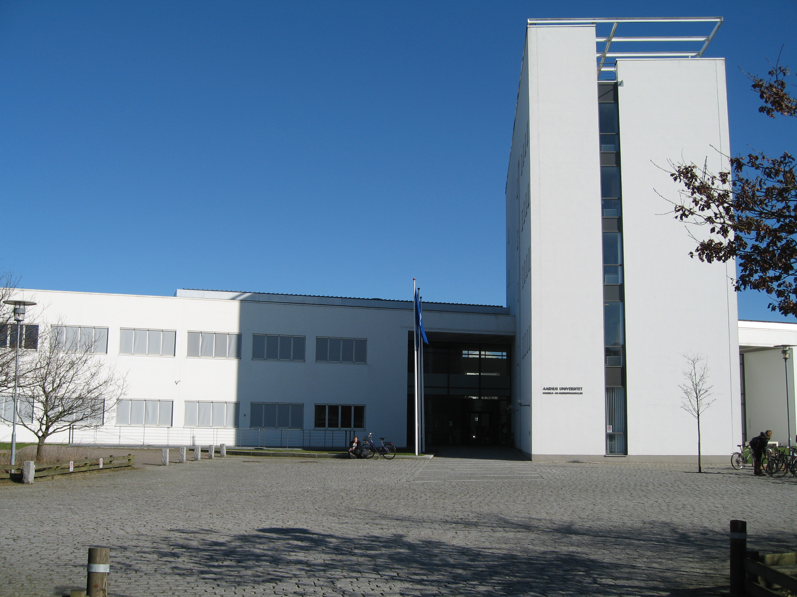 Århus Universitet, Handels- og Ingeniørhøjskolen i Herning - AU-HIH, AU-IBT